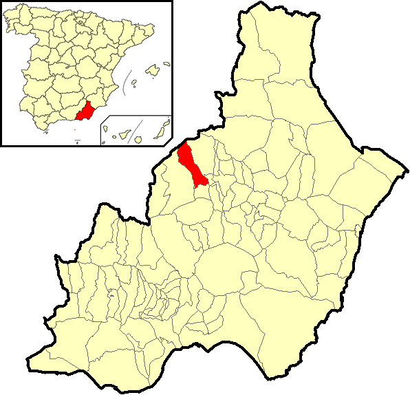 Situación del término municipal de Tíjola respecto a la provincia de Almería, en España.